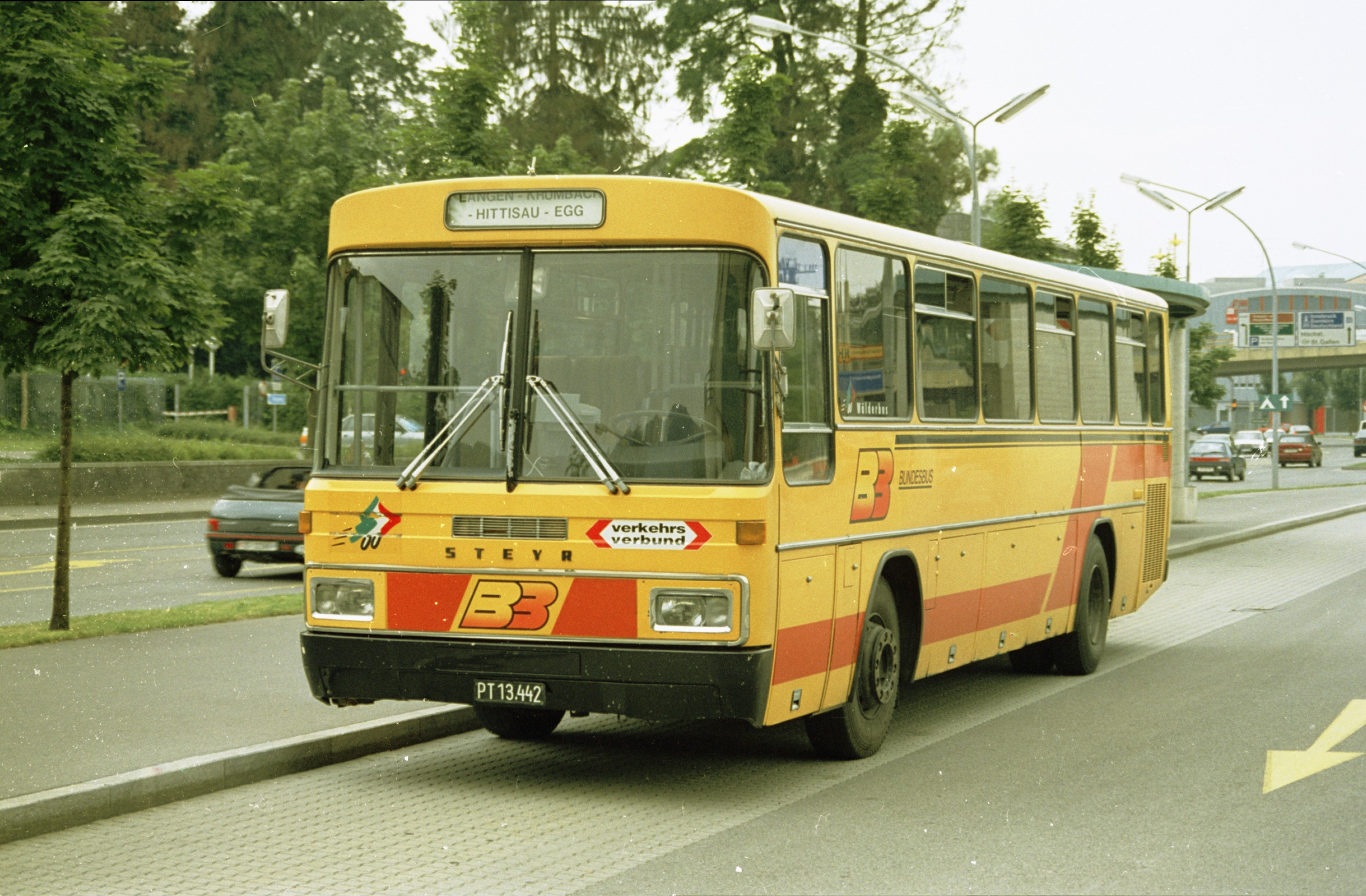 pausierender Steyr SML (PT 13.442) der Österreichischen Post / Bundesbusdienste am Bahnhof in Bregenz.